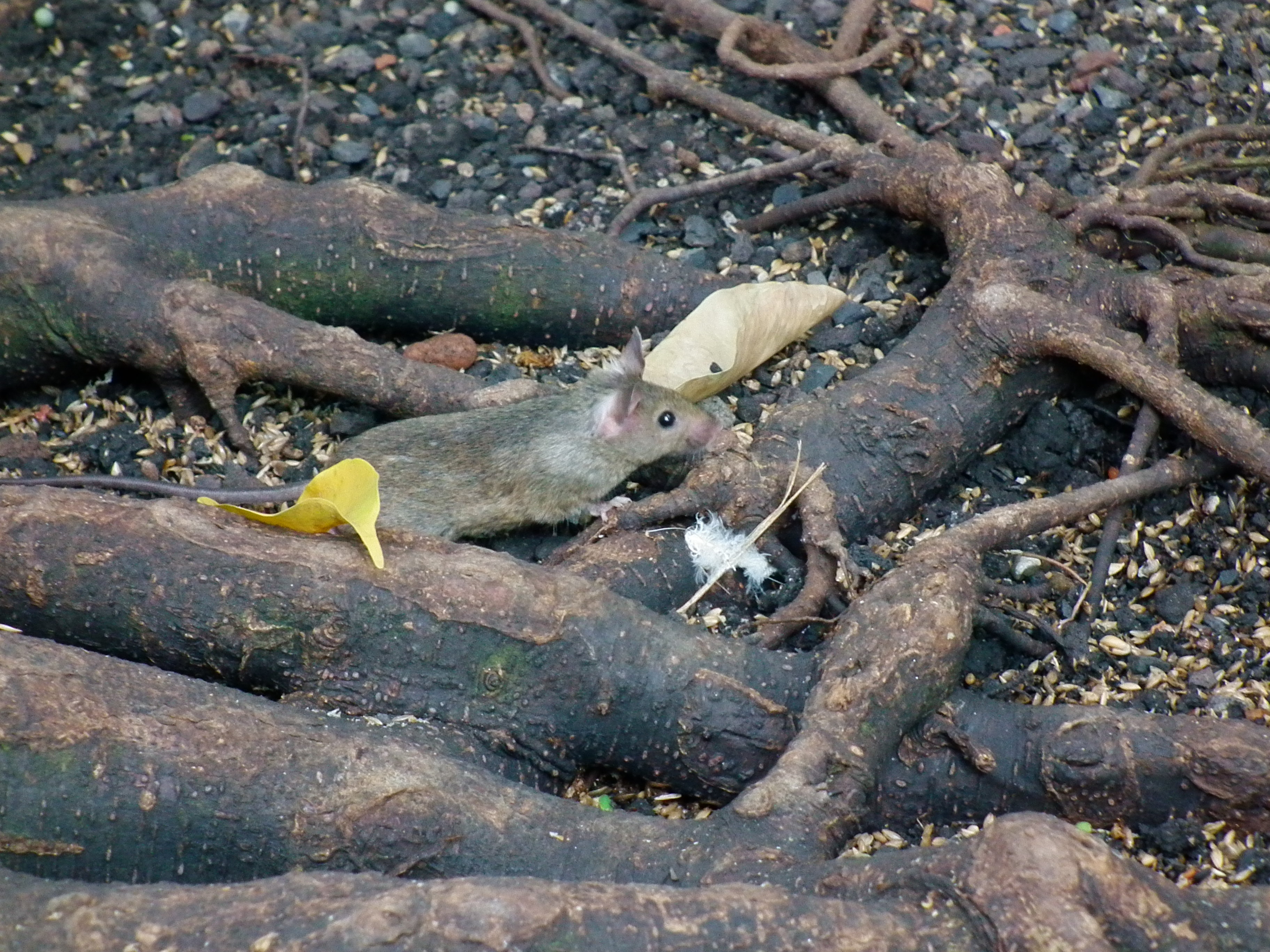 Hausmaus (Mus musculus), fotografiert in Heidelberg (Baden-Württemberg, Deutschland)